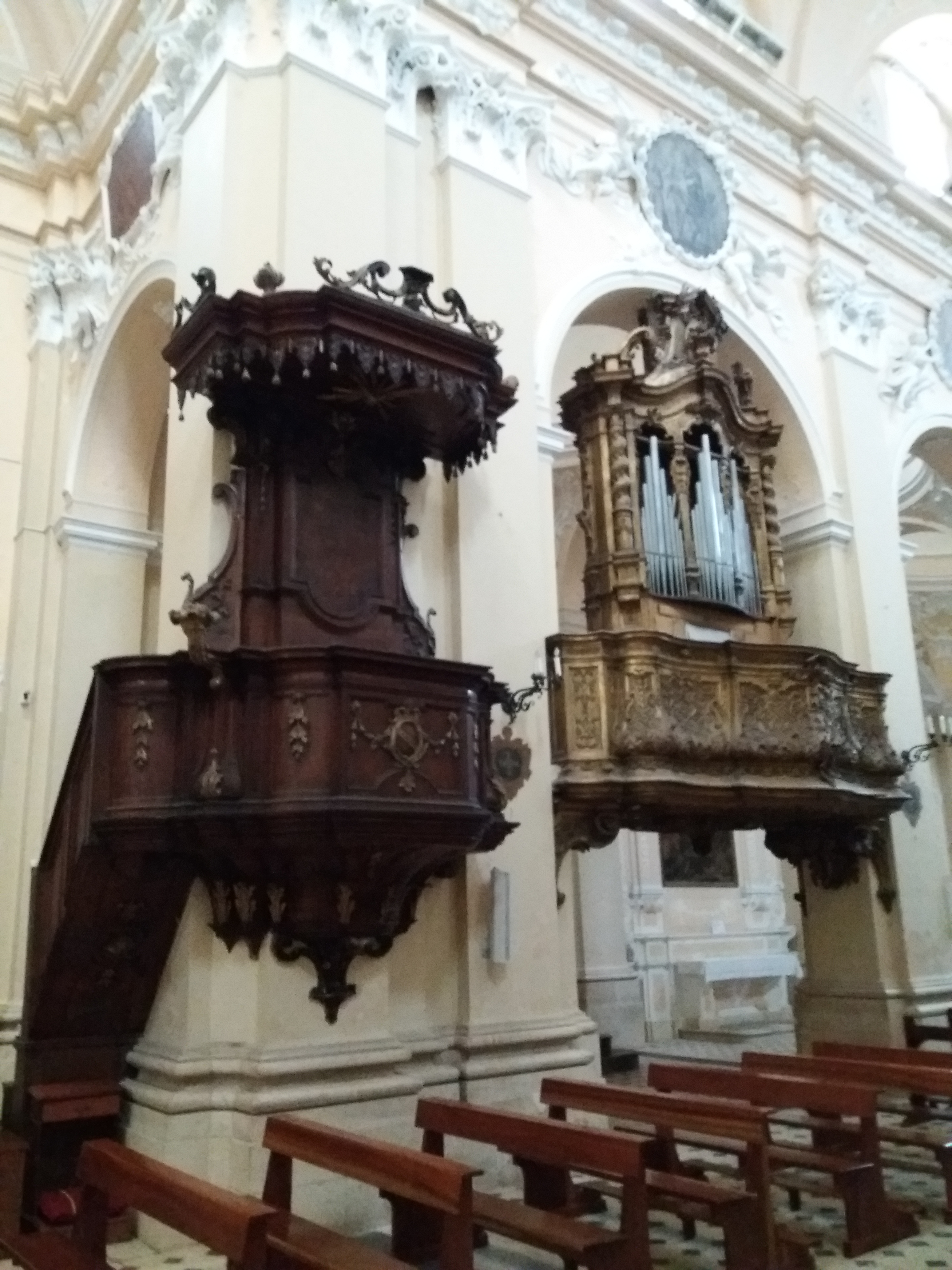 Sulmona: Chiesa della Santissima Annunziata